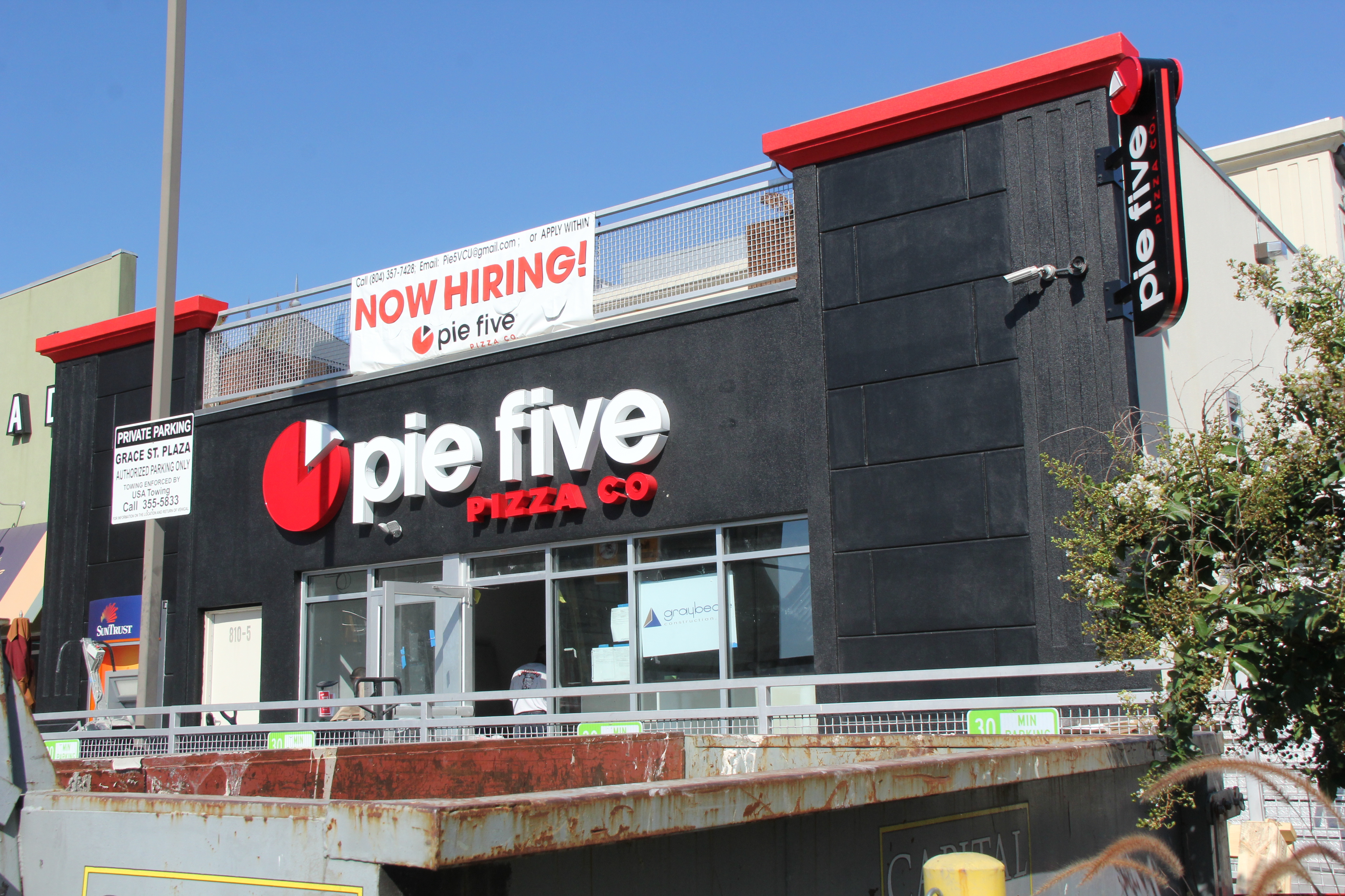 Pie Five in Richmond, Virginia.